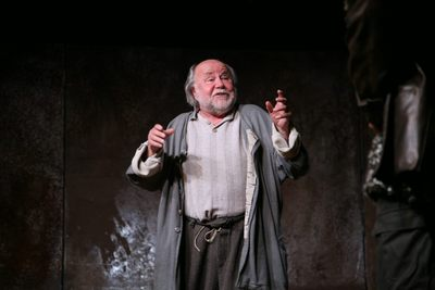 Haumann Péter magyar színművész.